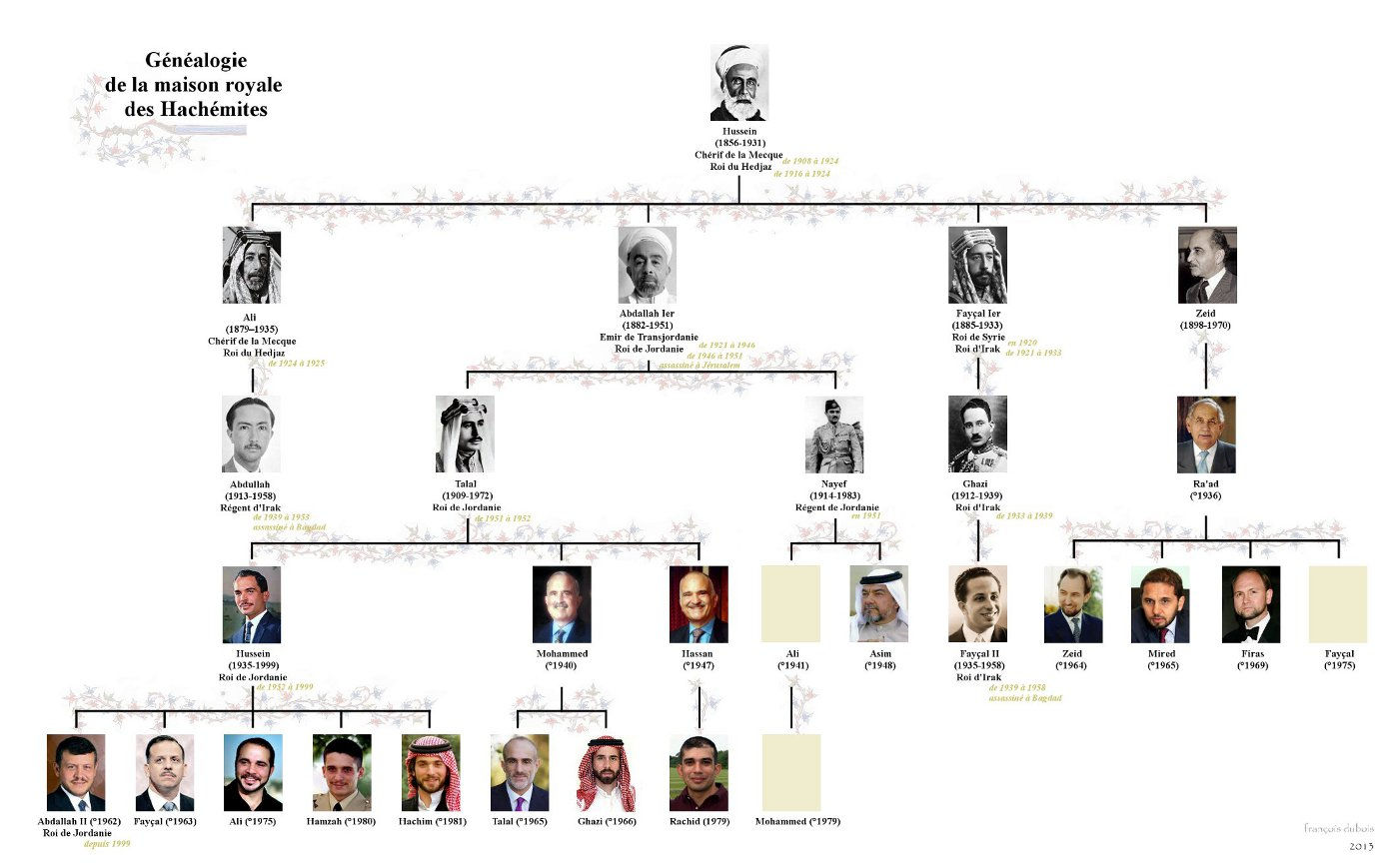 Généalogie de la maison royale des Hachémites.